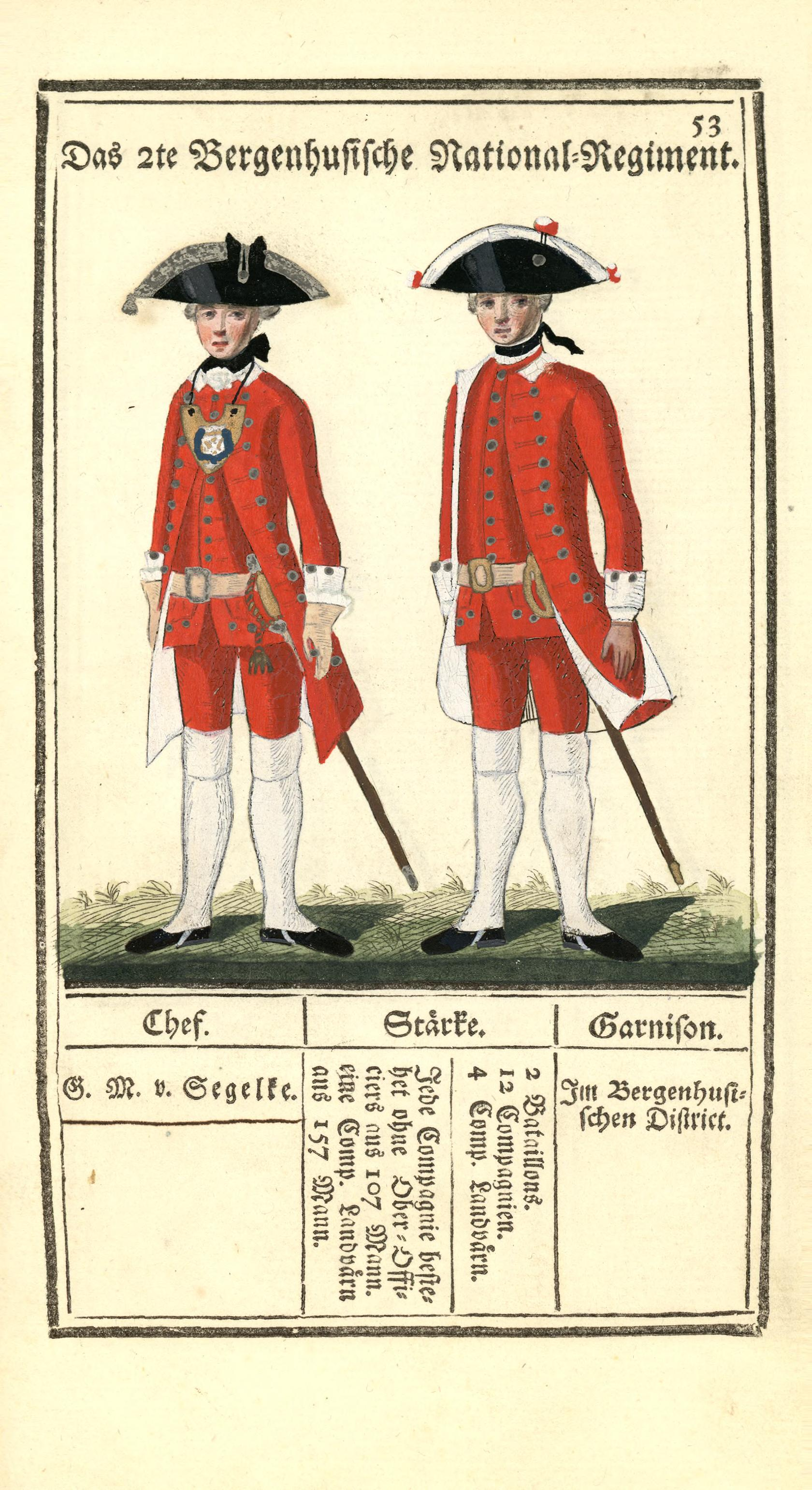 Illustrasjon hentet fra boken "Vorstellung der sämtlichen Königl. Dänischen Armee" av Bertram, Carl og utgitt av Carl Bertram (dk, 1763)